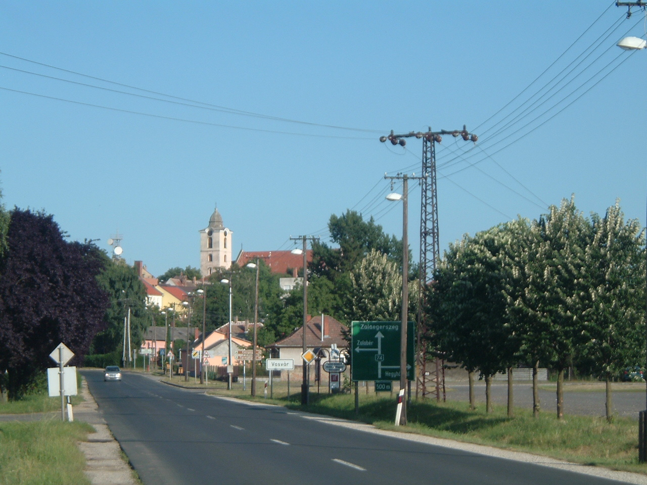 Vasvár, Hungary